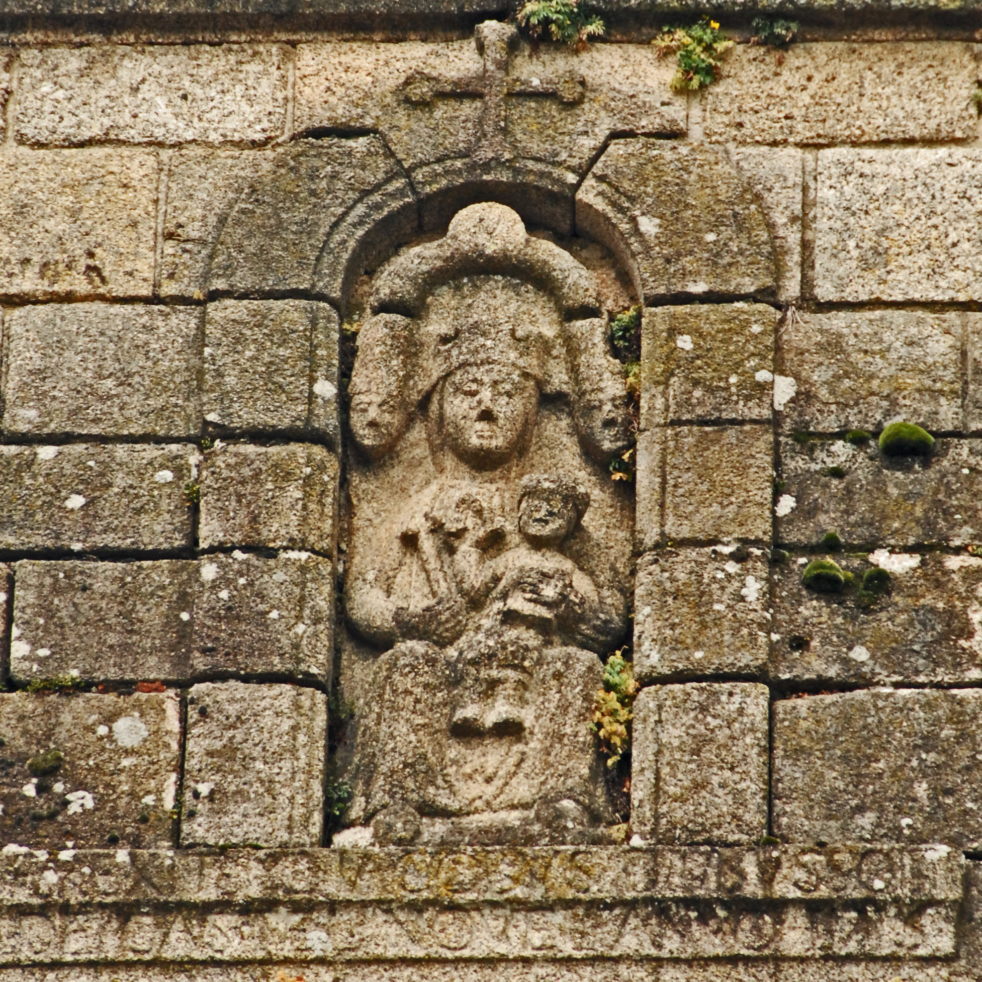 N.-D._de_La_Souterraine.Skulptur 2